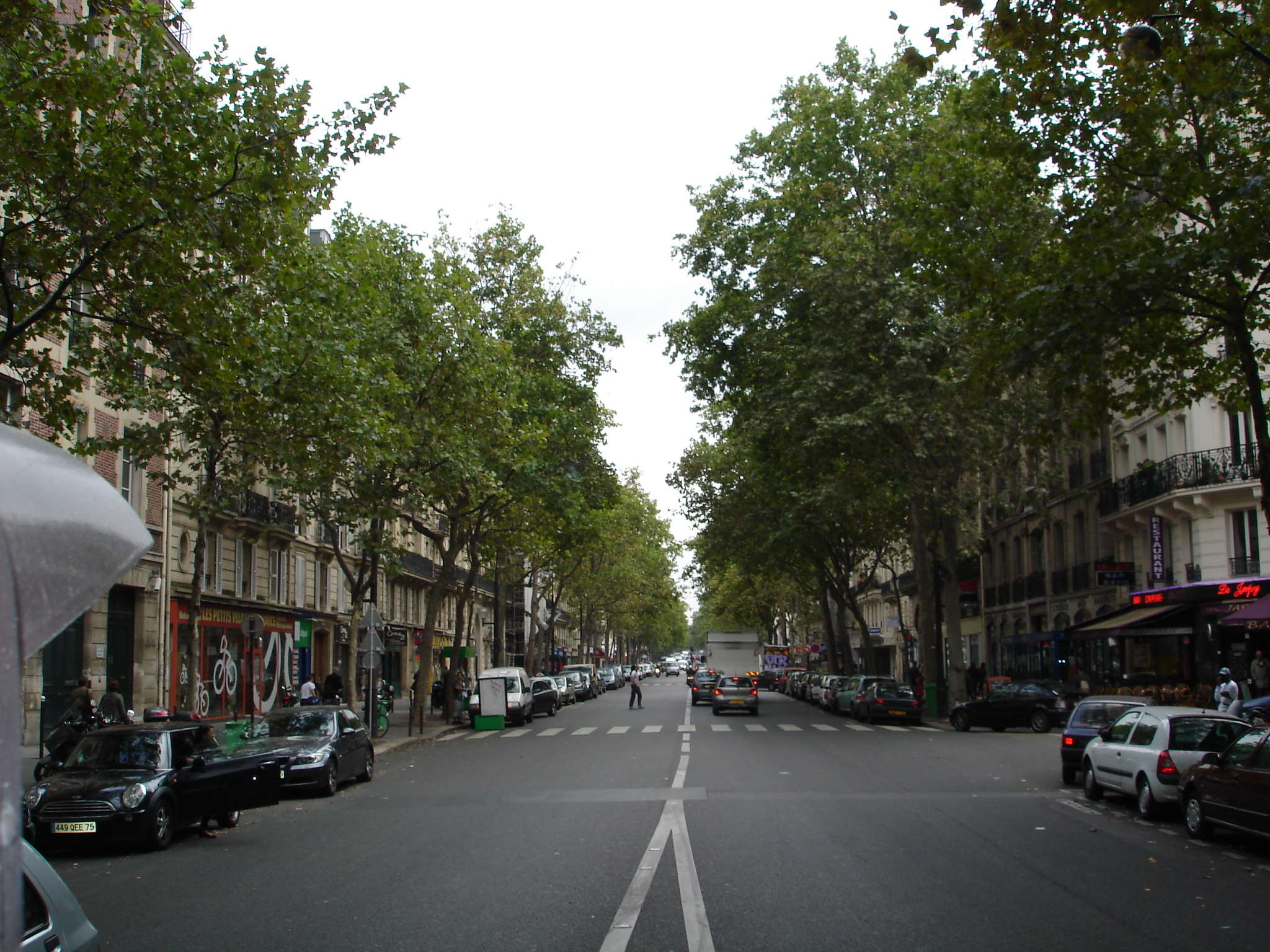 Boulevard Voltaire (Paris 11e arrondissement)- General View